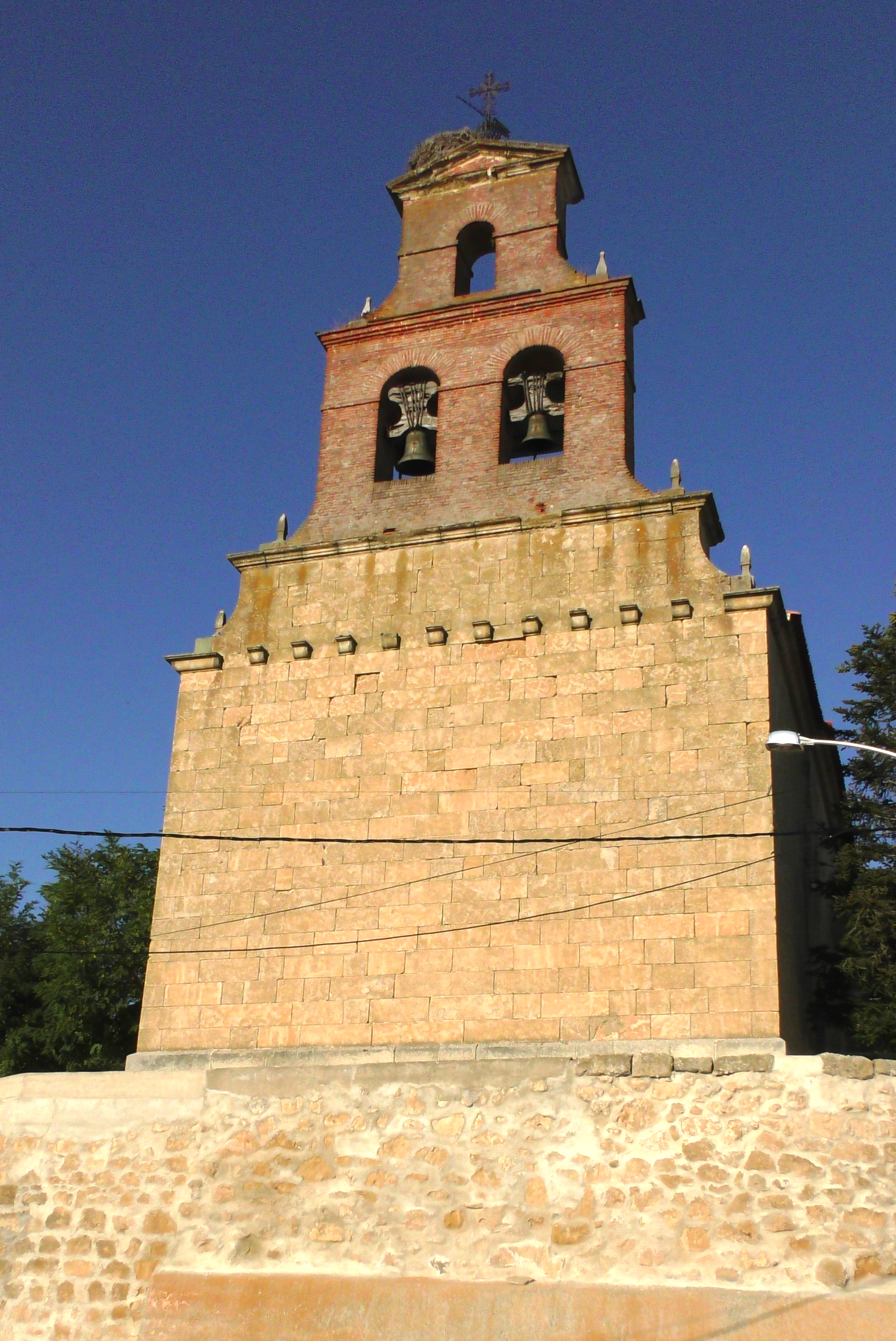 El Piñero